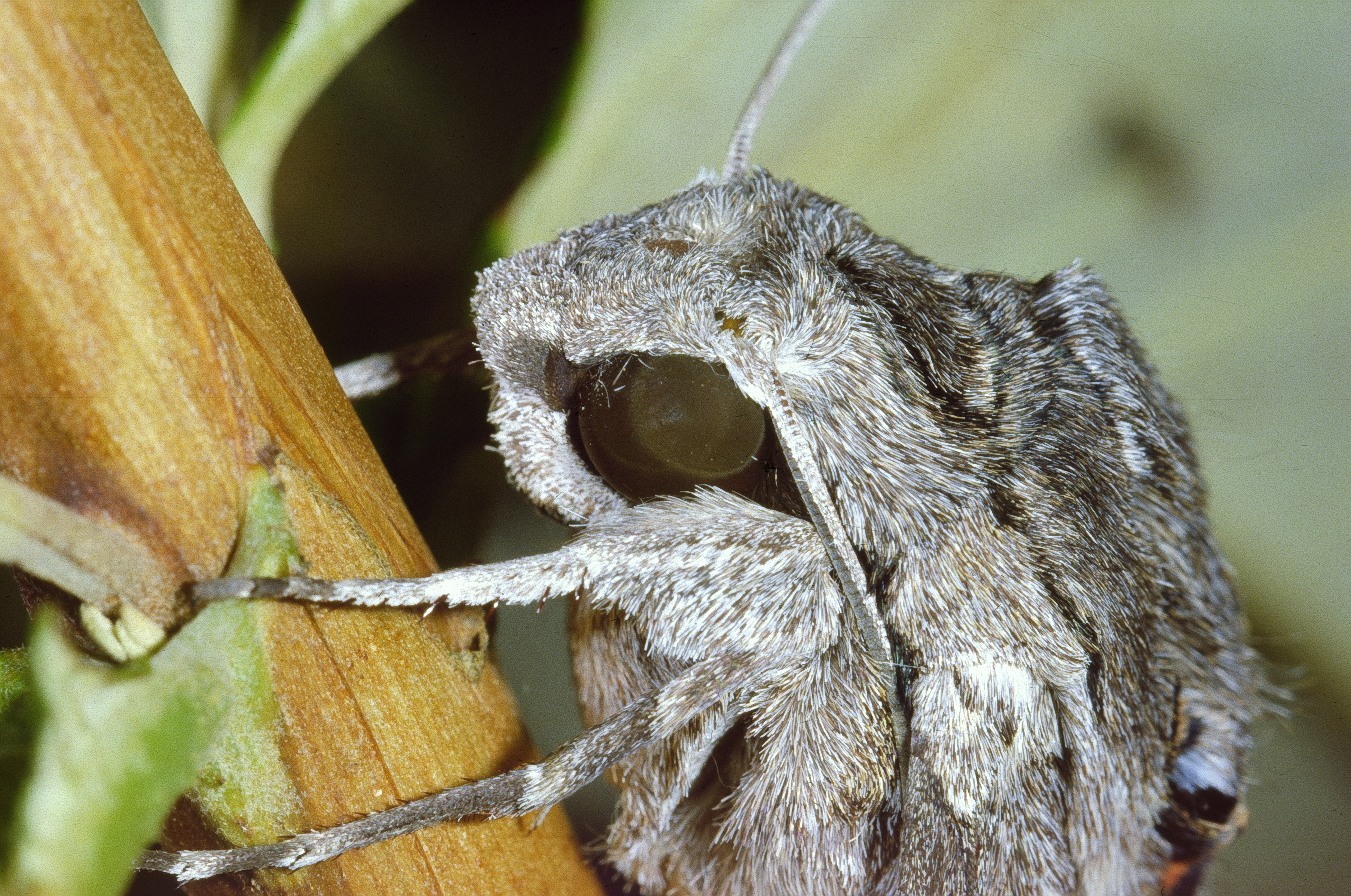 Agrius convolvuli (Sphinx du liseron) photographed in Calvados in France.